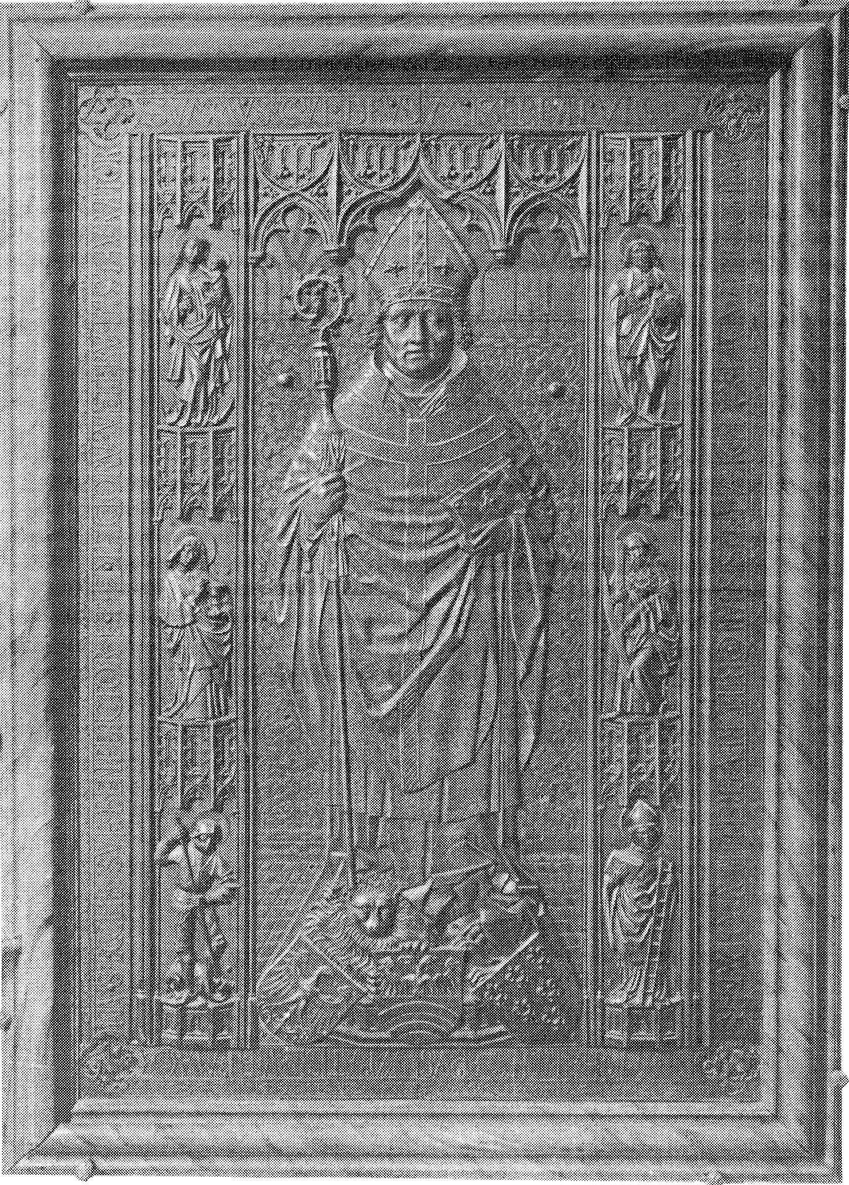 Epitaph für Bischof Johann IV. Roth im Breslauer Dom.